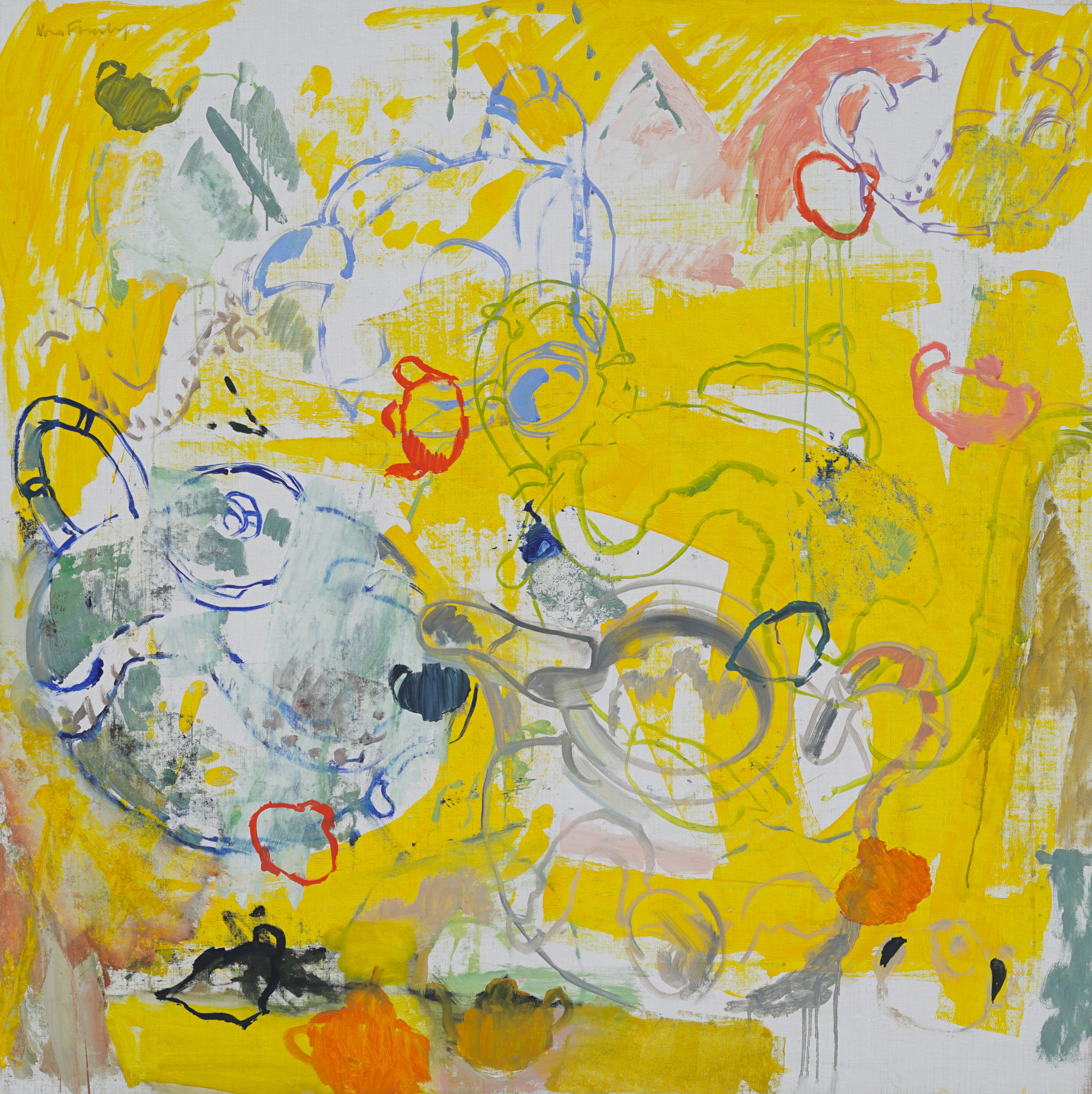 ארבע עונות - קיץ - 1992